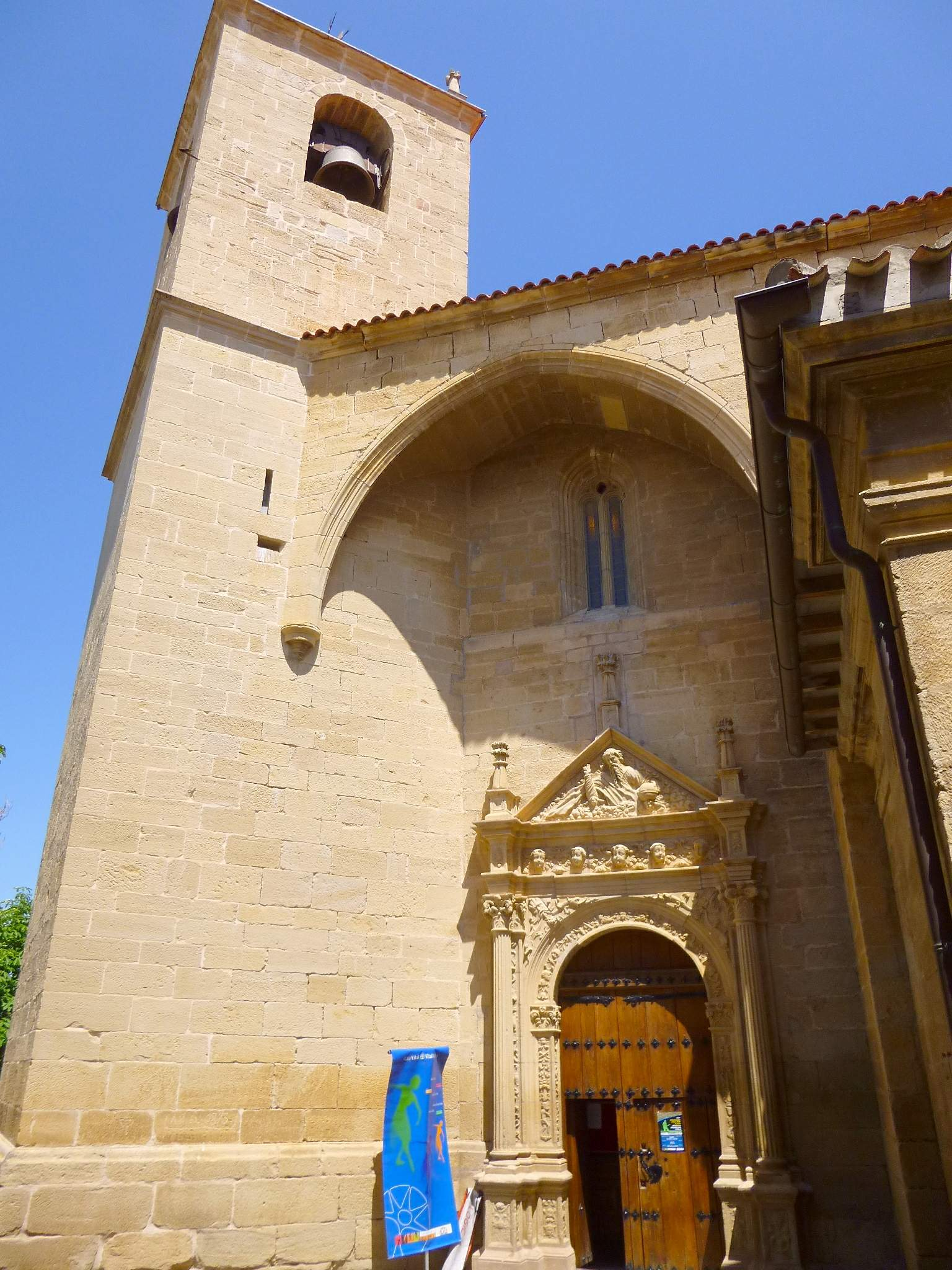 Iglesia de Santa María (Moreda de Álava)